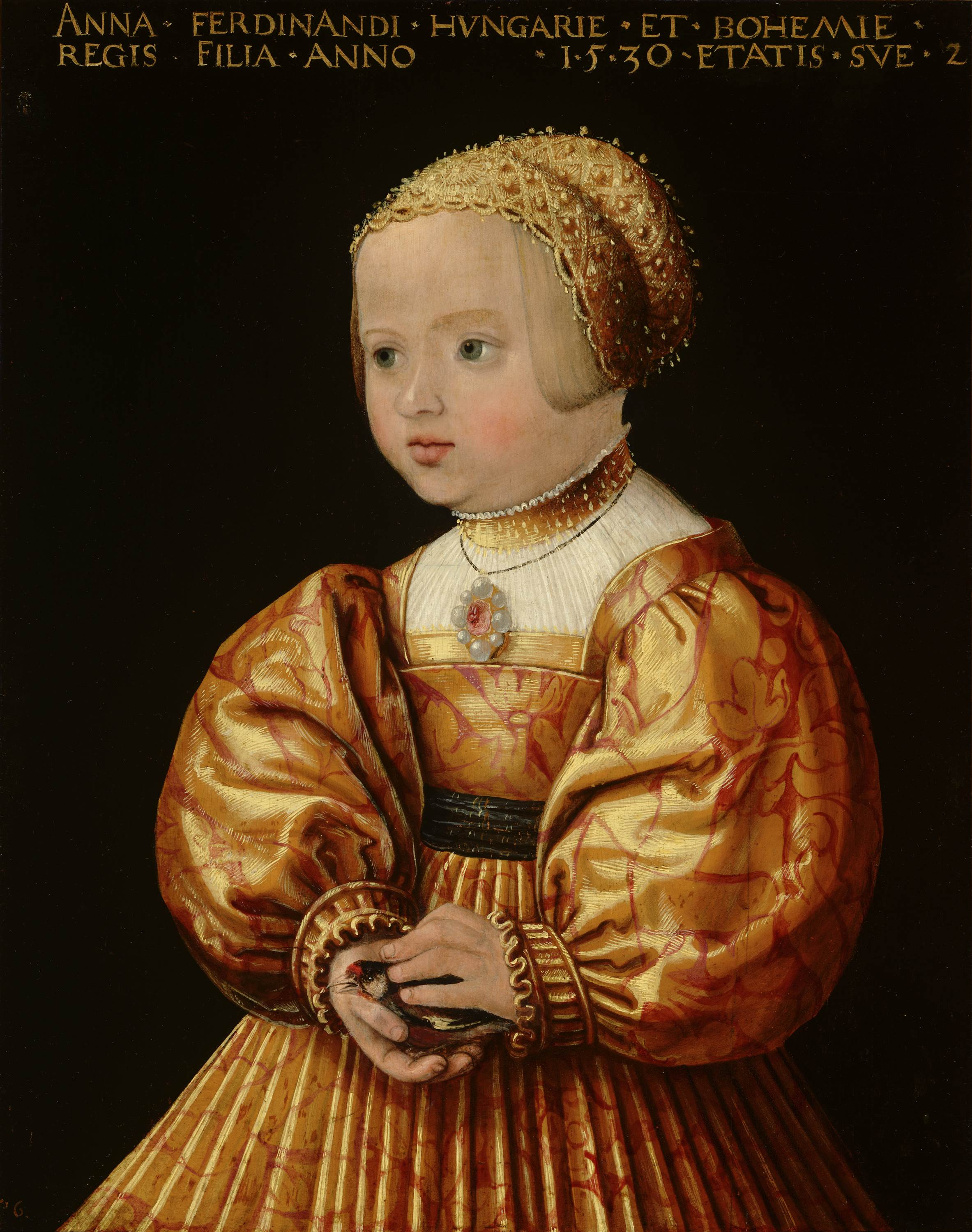 Portret van Anna van Oostenrijk. 1530. oil on panelmedium QS:P186,Q296955;P186,Q287,P518,Q861259. Height: 44.7 cm (17.5 ″); Width: 34.8 cm (13.7 ″) dimensions QS:P2048,44.7U174728;P2049,34.8U174728. The Hague, Mauritshuis.